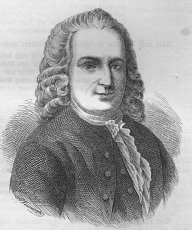 Johann Christian Günther (1698-1723)